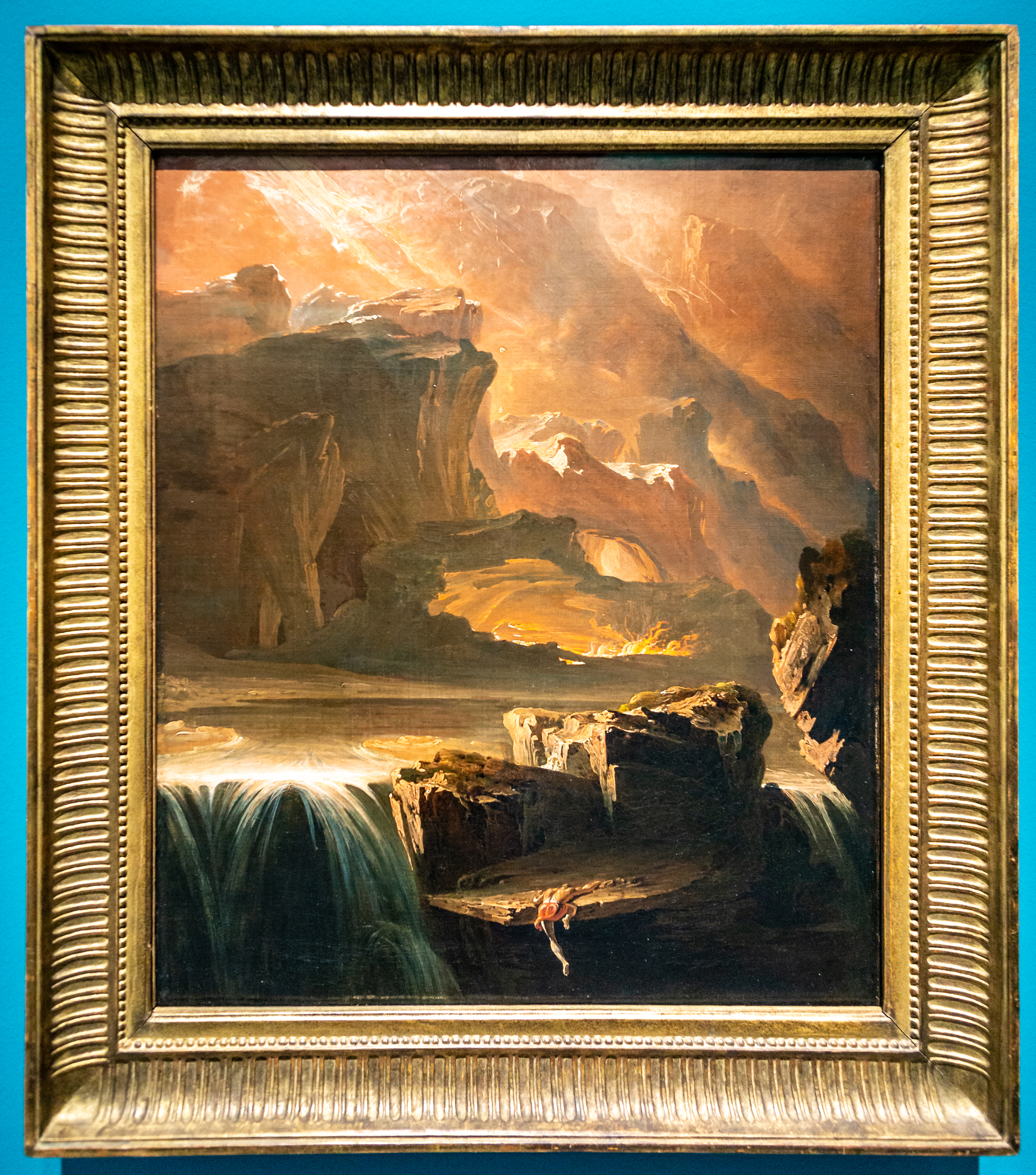 Sadak auf der Suche nach den Wassern des Vergessens